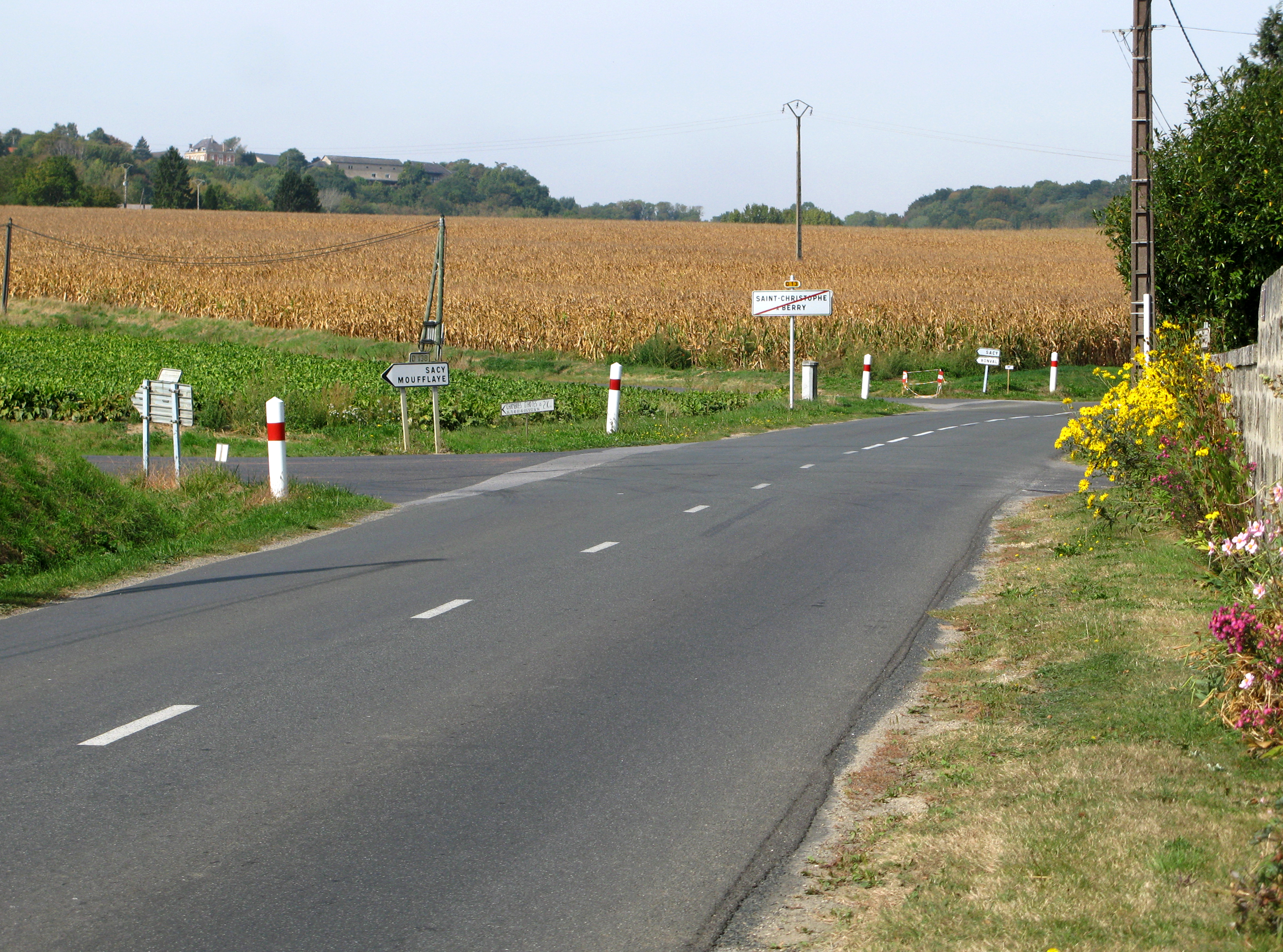 Saint-Christophe-à-Berry (Aisne, France) - La sortie du village, par le Nord. . .